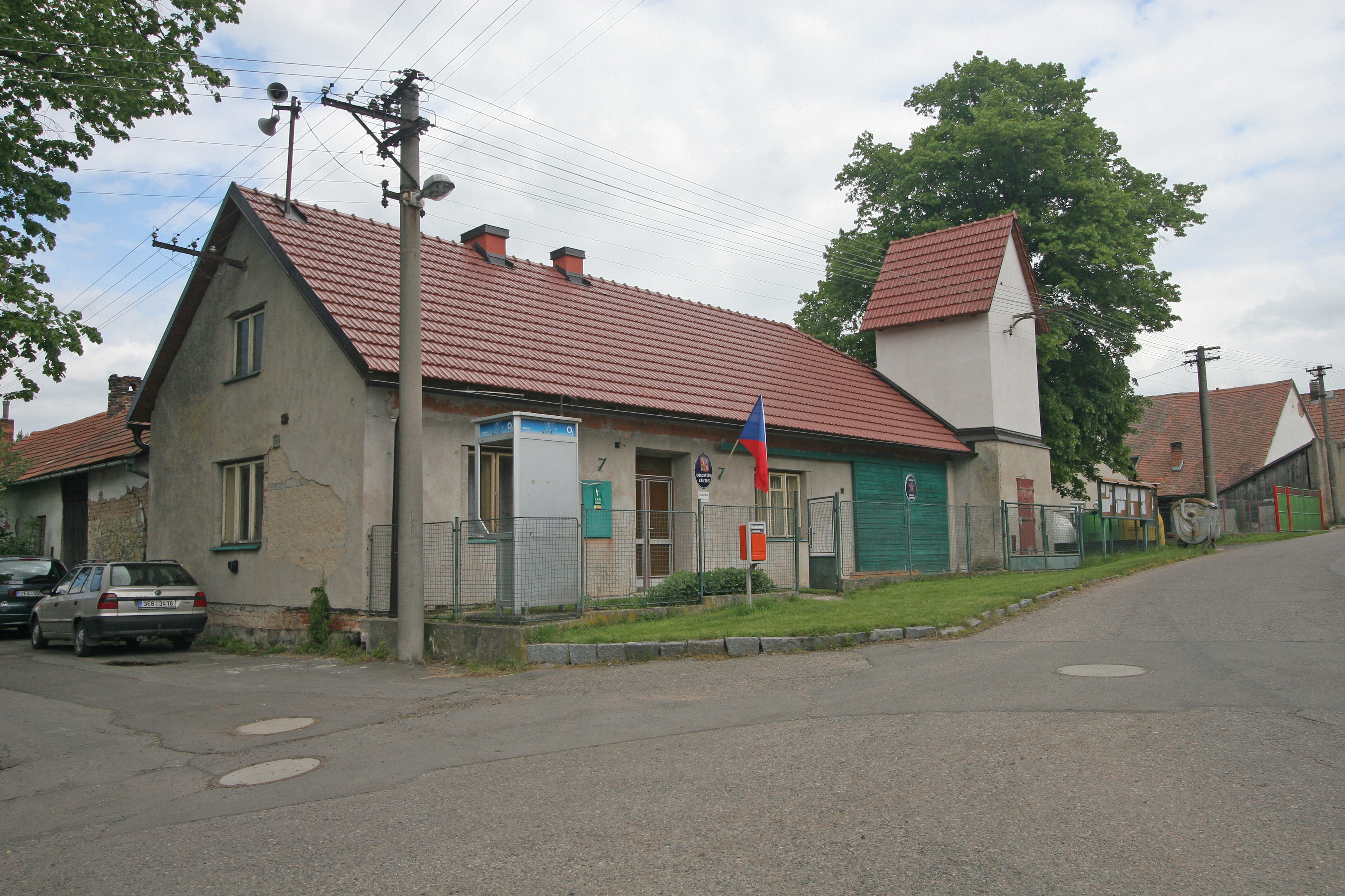 Zájezdec obecní úřad